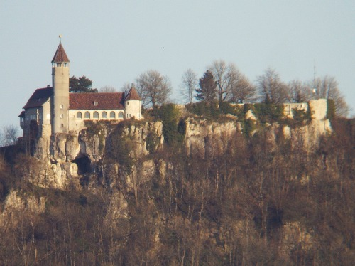 Gesamt-Vorderansicht der Burg Teck mit Sibyllenloch